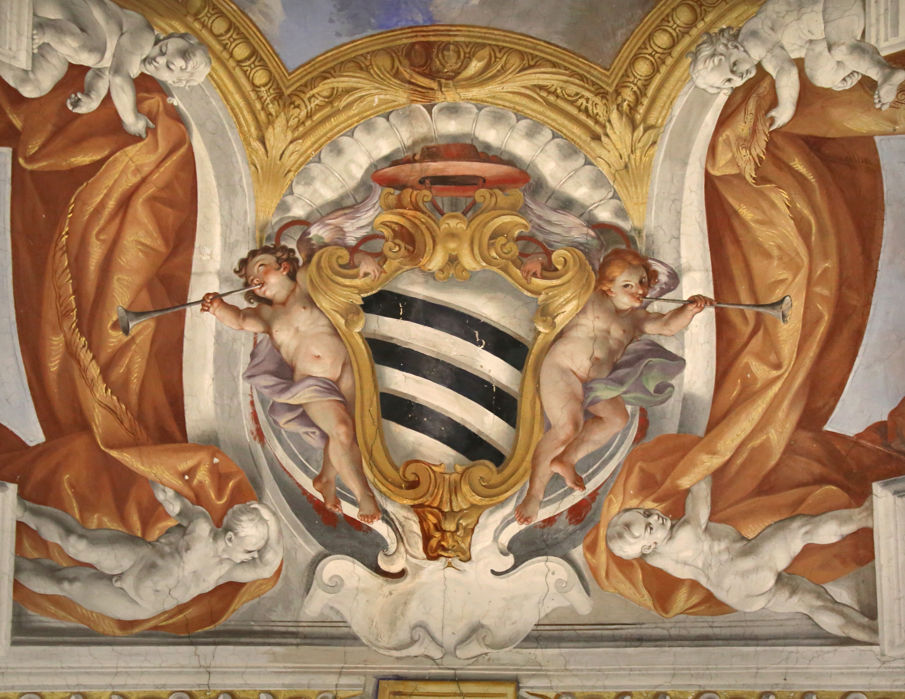 Duomo (Viterbo) This is a photo of a monument which is part of cultural heritage of Italy.